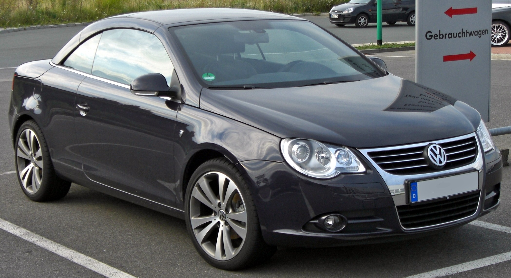 VW Eos „Individual“